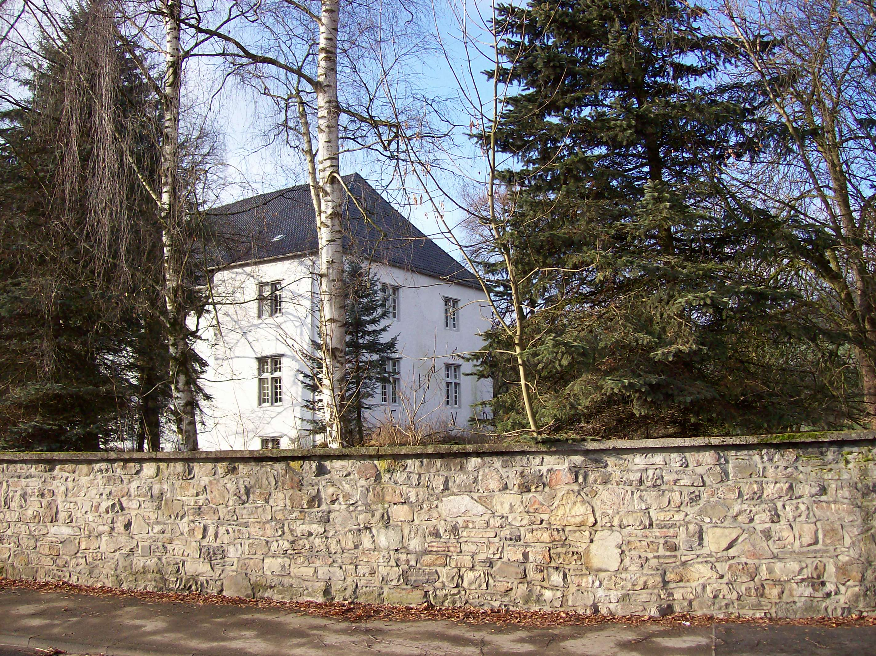 Haus Niederberge (Anno 1664) in Meschede-Berge, 2008